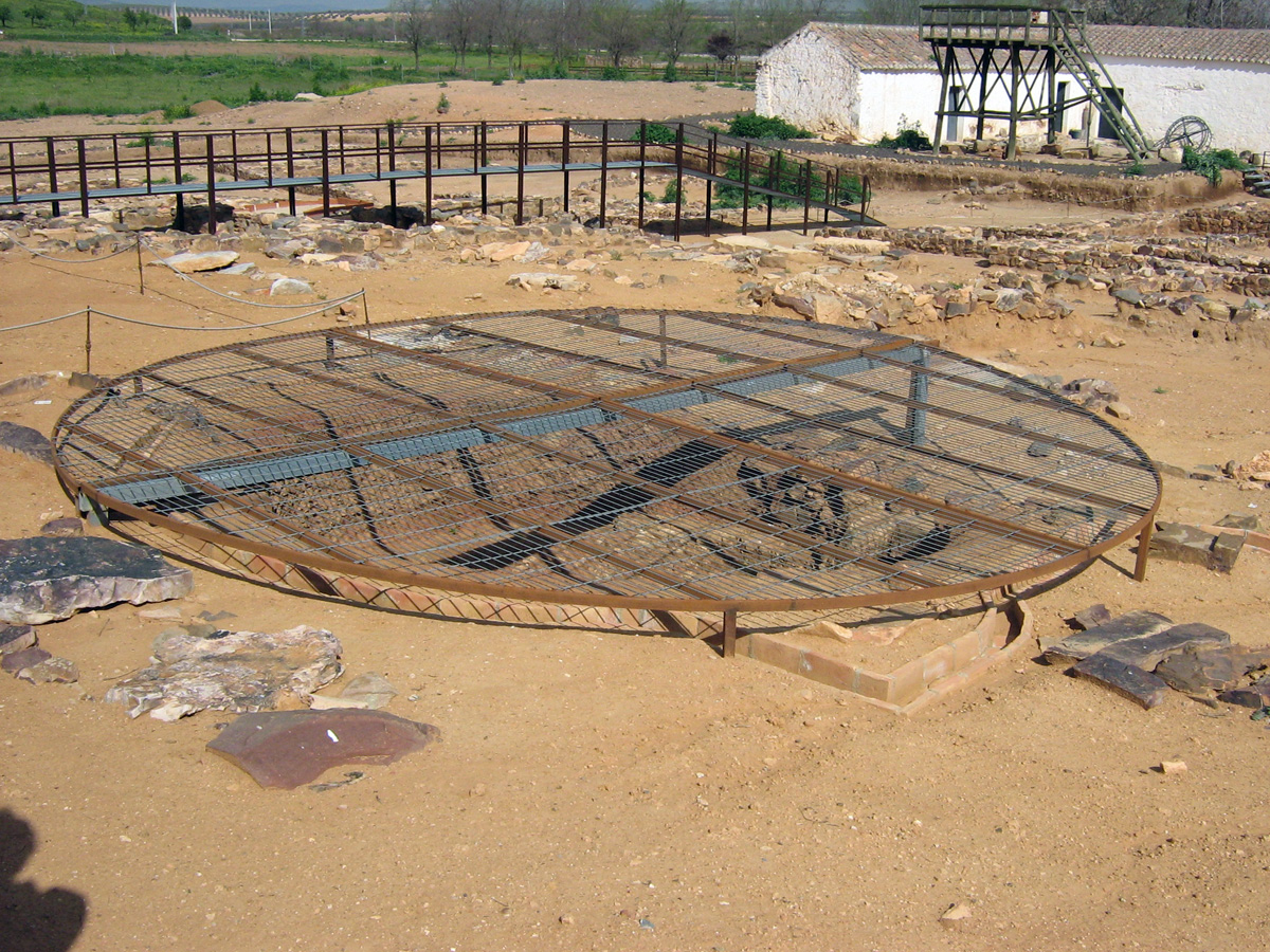 Fotografía del yacimiento de Oreto-Zuqueca, en Ciudad Real (España). Se trata de un horno para quemar cal.